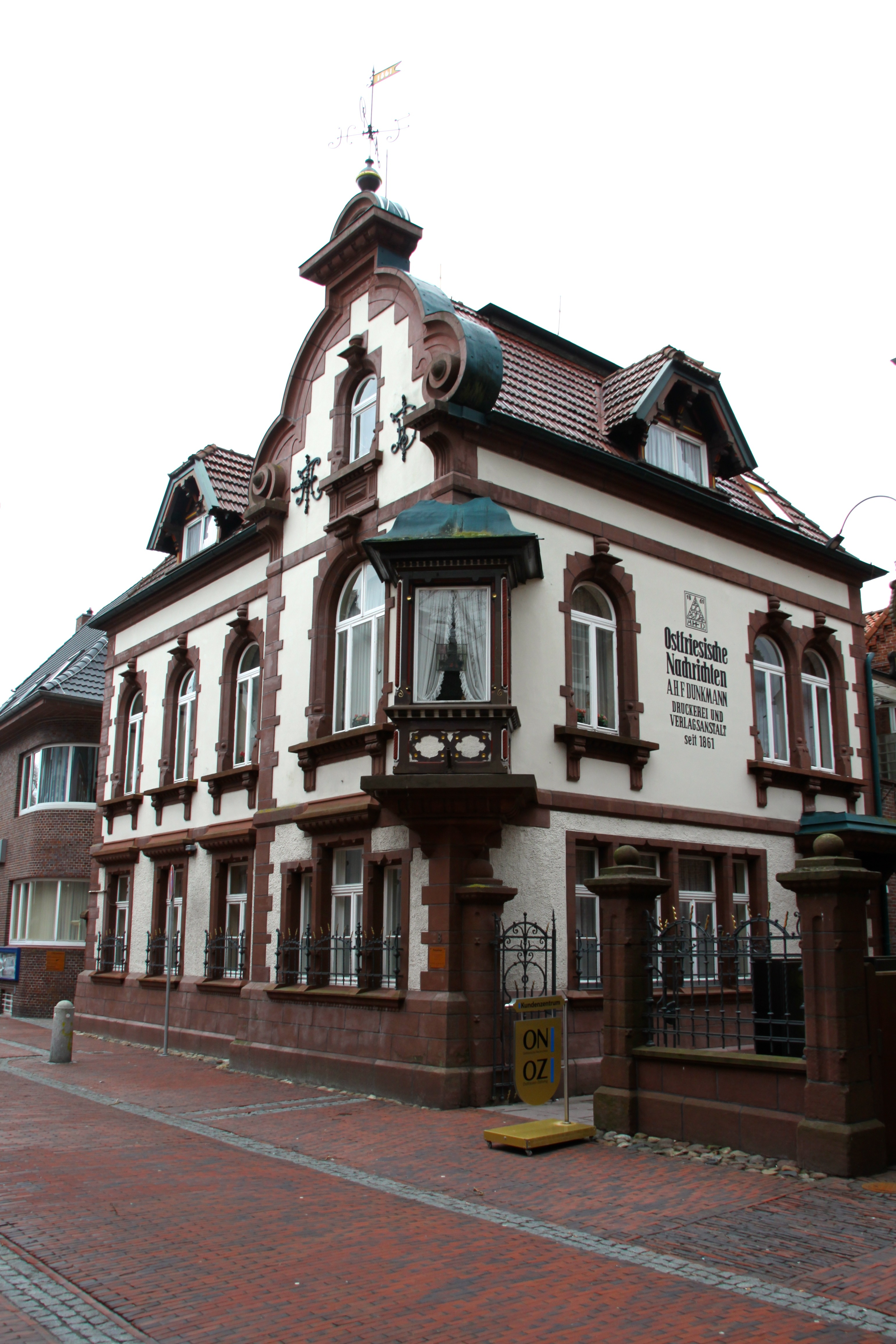 Haupstitz der ostfriesischen Nachrichten in Aurich.